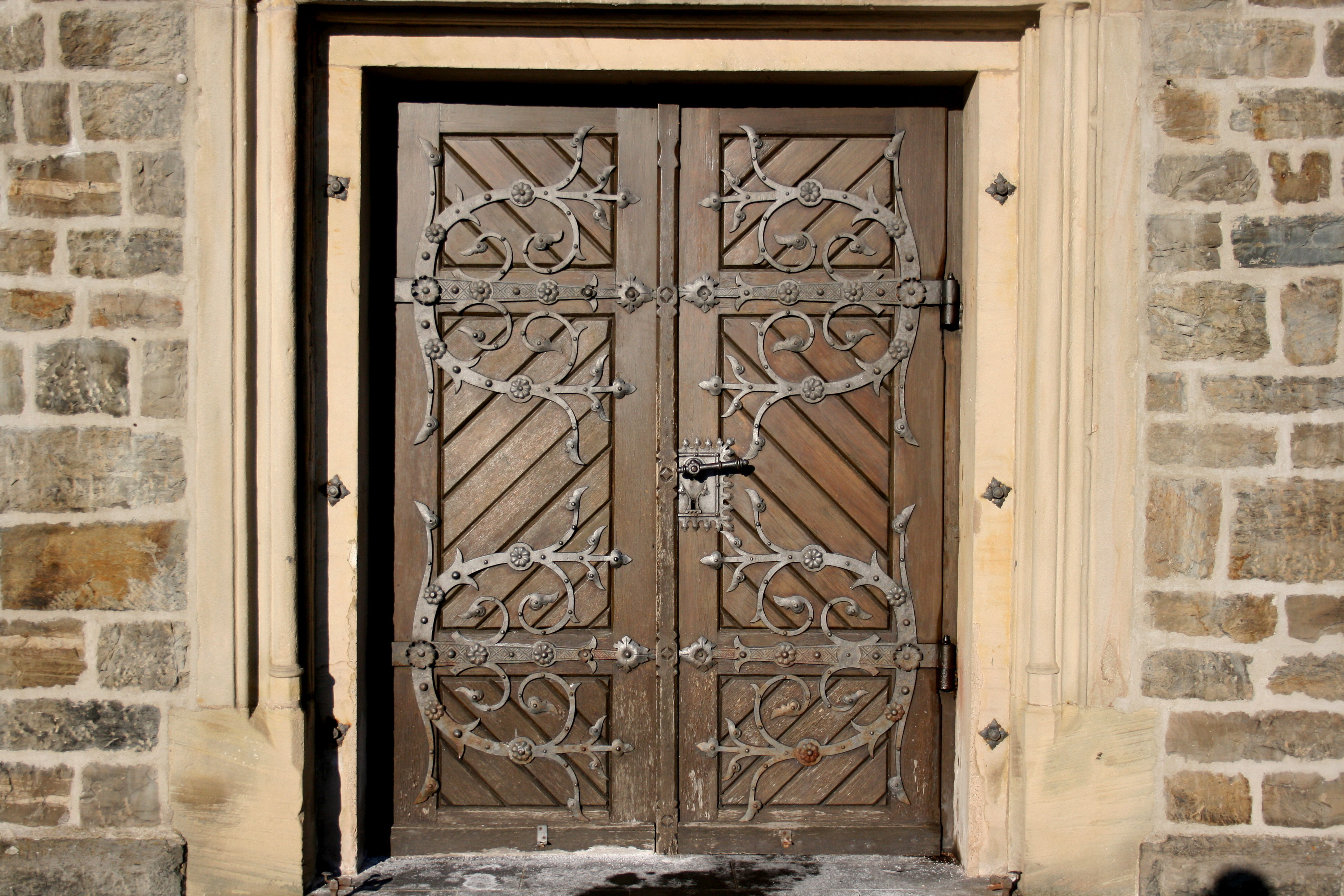 Sankt Michael am Eggenpfad in Werdohl